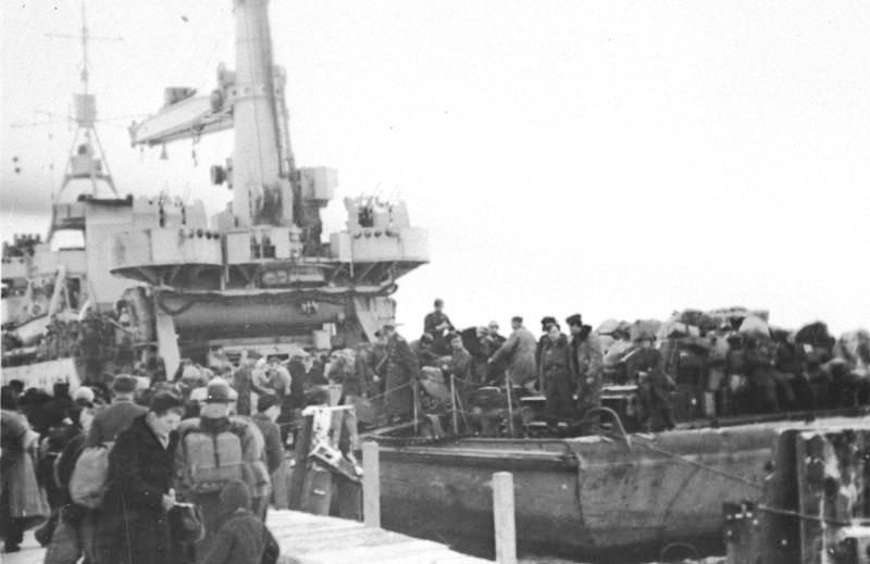 Bergung von Flüchtlingen aus Königsberg mit F.S.S. "Wedel" 1945